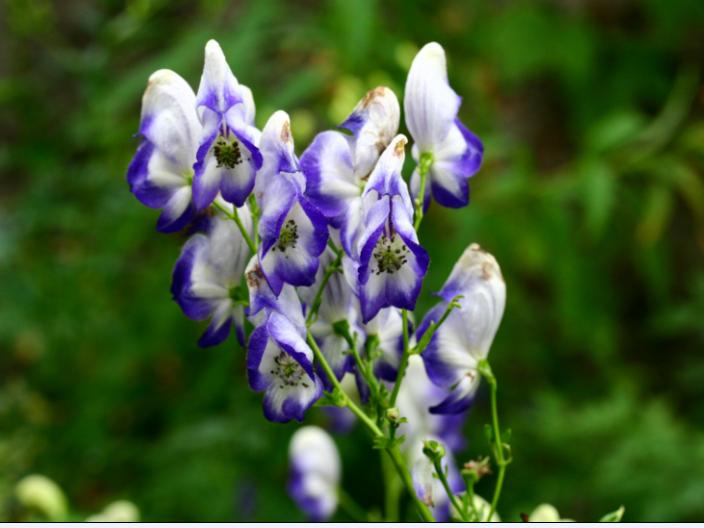 Aconitum variegatum